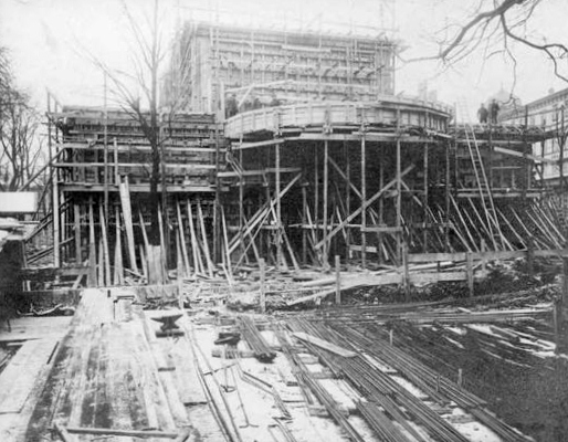 Bau der Bad Kissinger Wandelhalle 1910; Blick auf die Rückseite mit Konzertbühne